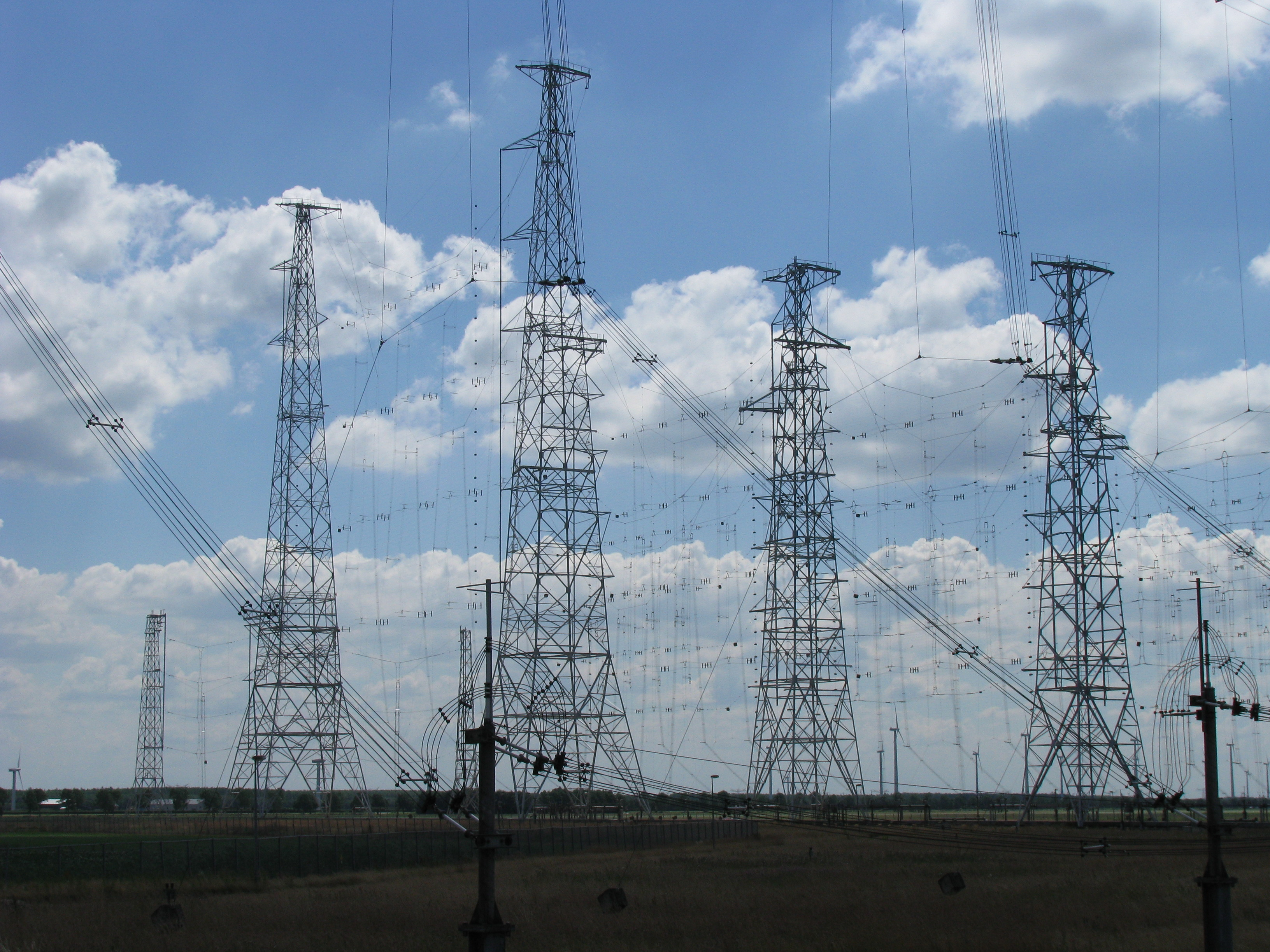 Kurzwellensender Flevo